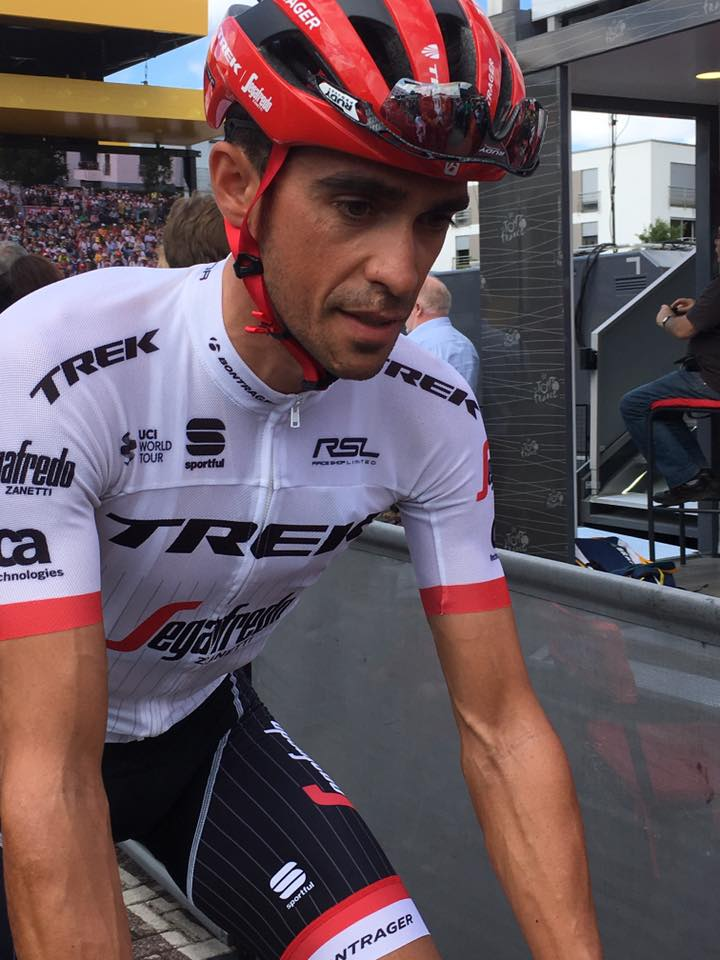 Alberto Contador au départ de la 4ème étape du Tour de France 2017